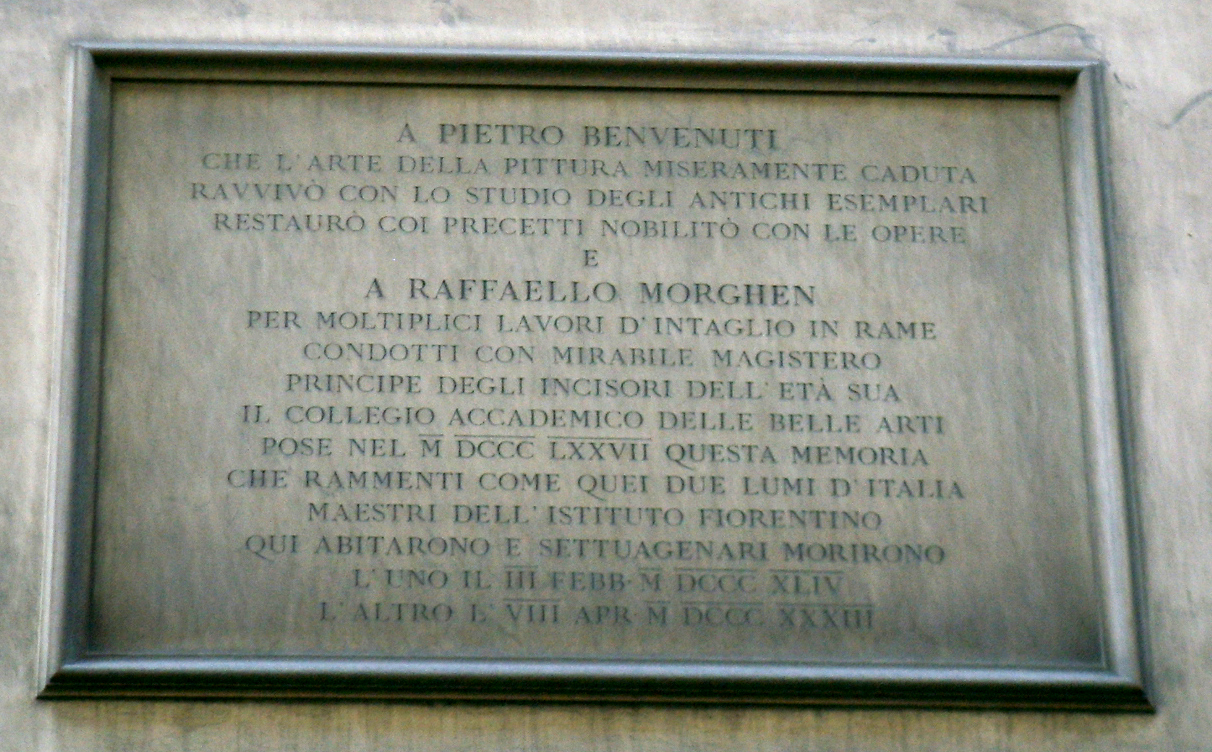 Targa pietro benvenuti e raffaello morghen, opificio via alfani